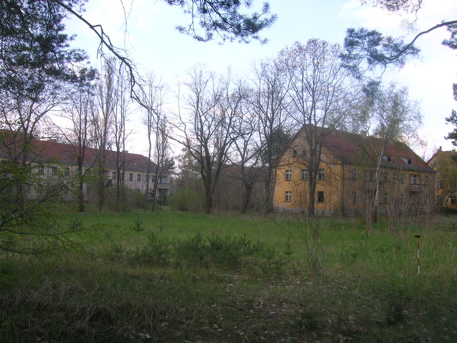 Kummersdorf Gut in Kummersdorf-Gut in Brandenburg, Kasernenruinen